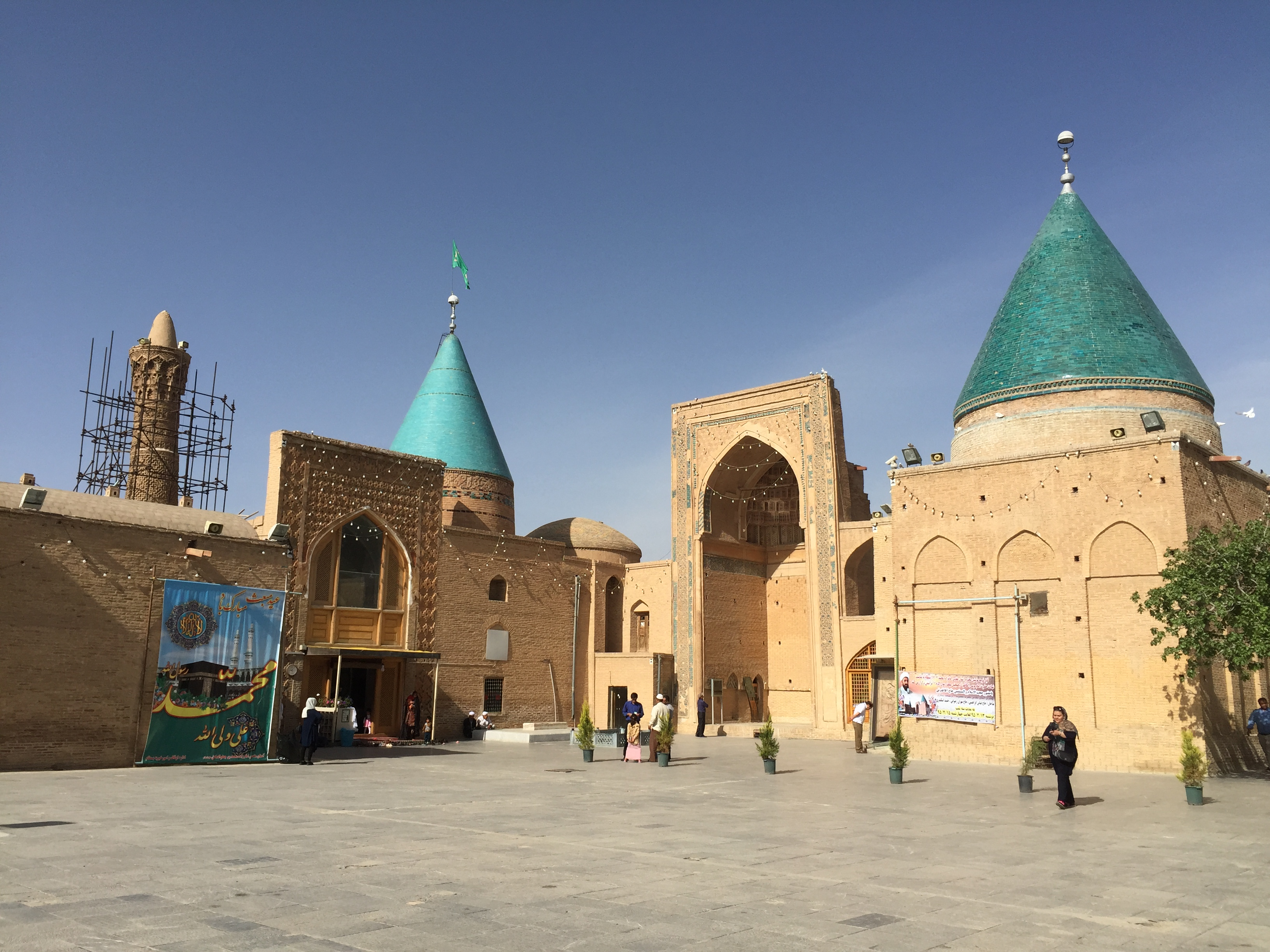 مسجد شیخ بسطامی